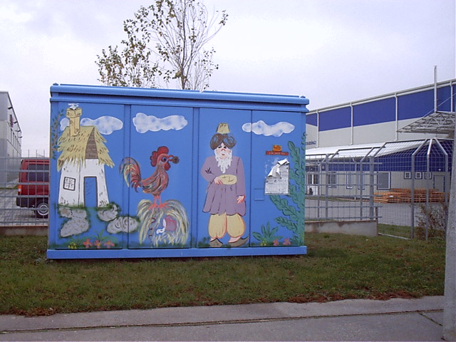 Graffitivel díszített transzformátorállomás (Győr)